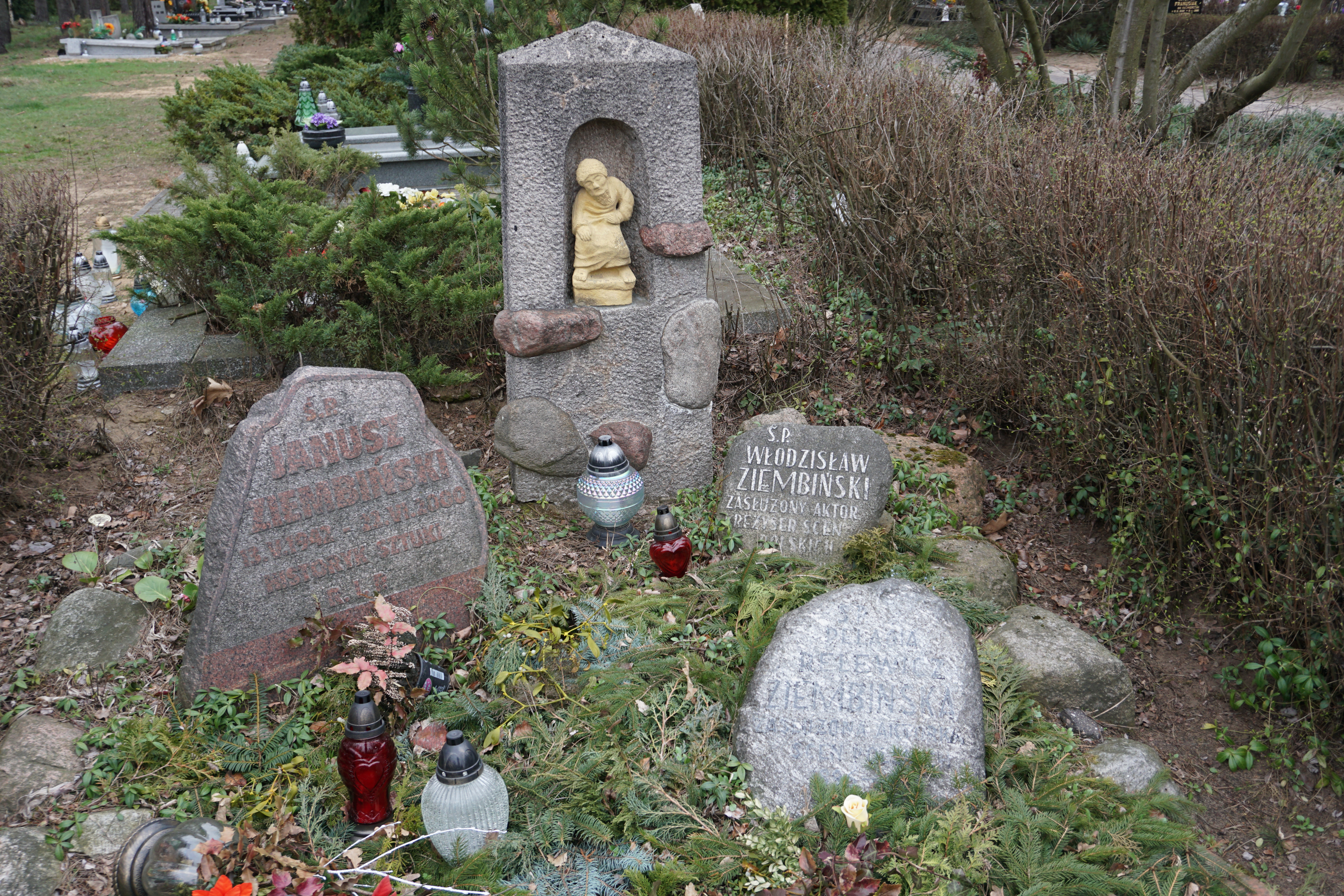 Grób Włodzisława Ziembińskiego na Cmentarzu Junikowskim